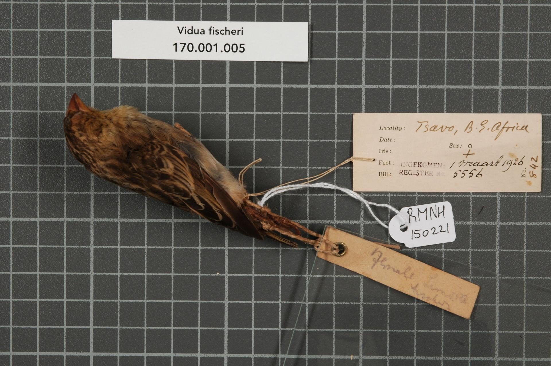 Presua fischeri (Reichenow, 1882)